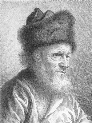 Starzec w czapce futrzanej. Akwaforta